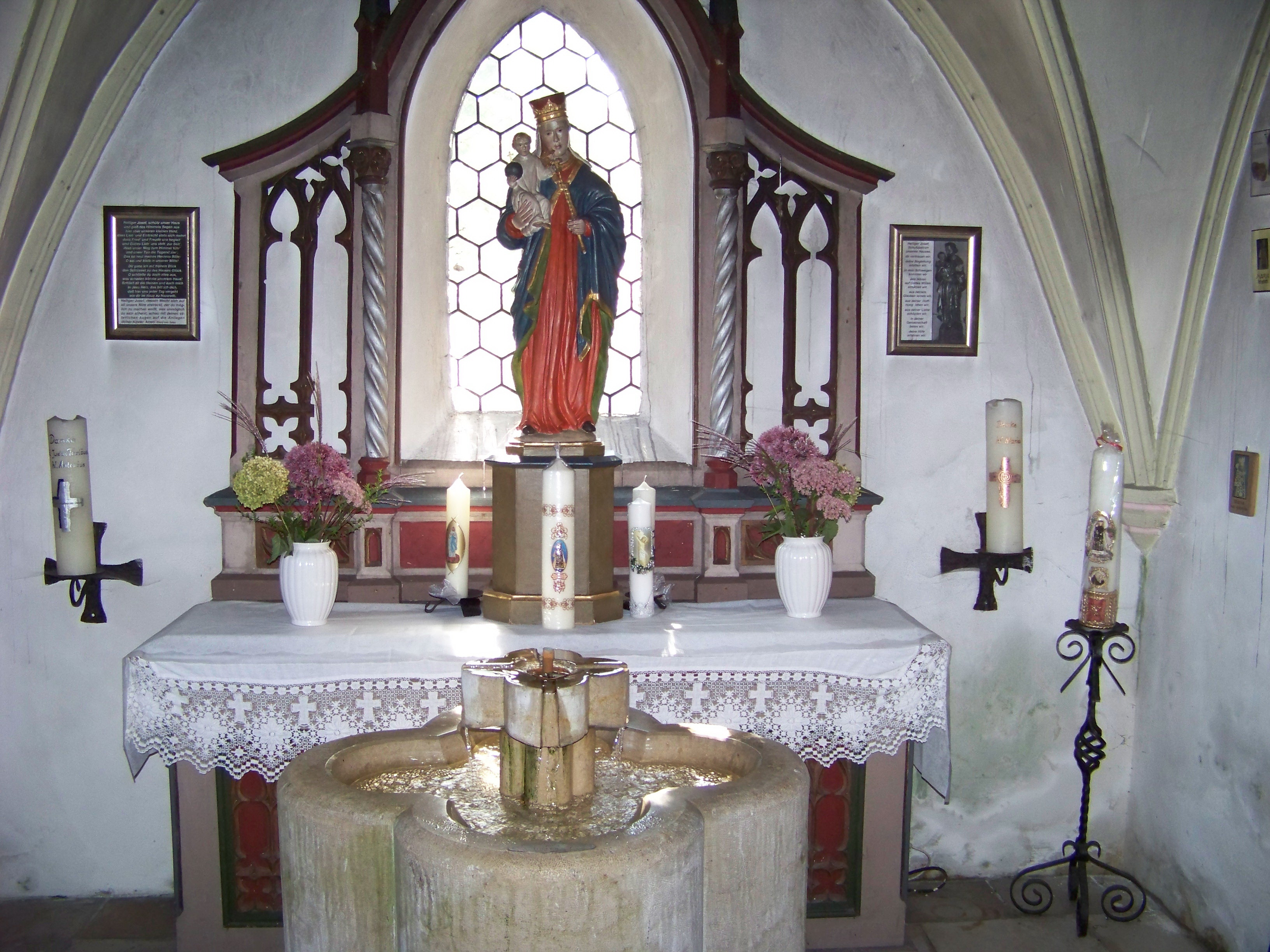 Hohenthann, Heiligenbrunn 36. Ein neugotischer Altar mit einer Madonnenstatue bildet den Hintergrund für den Brunnen, der über der ursprünglichen Quelle errichtet wurde. Votivtafeln und und Bilder neueren Datums zeigen, dass die Wallfahrt, wenn auch in kleinerem Maße, heute noch lebendig ist.